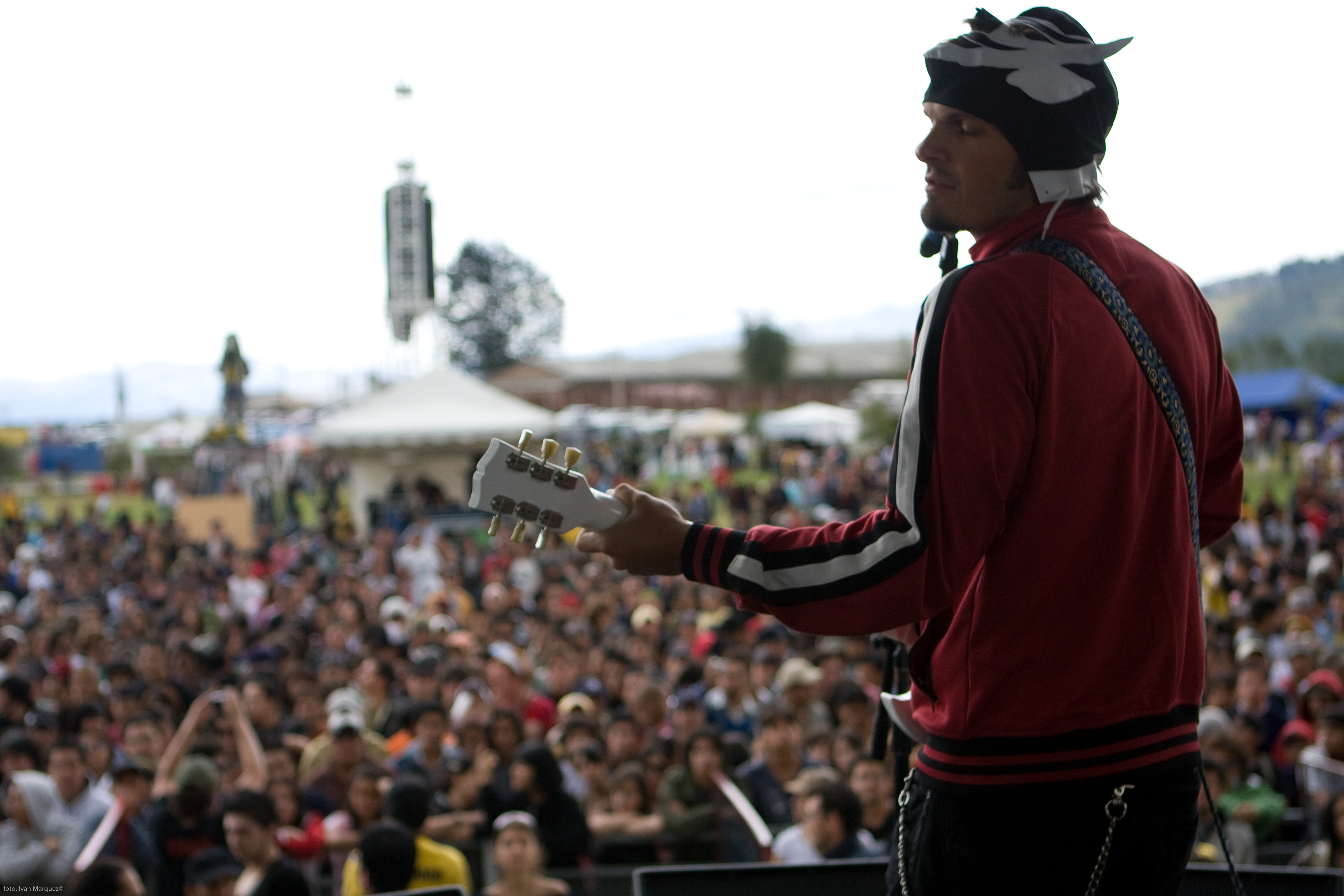 Cienfue en el Quito Fest 2007, Ecuador. Foto por Ivan Marquez ©cienfue 2007